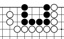 方四(圍棋)